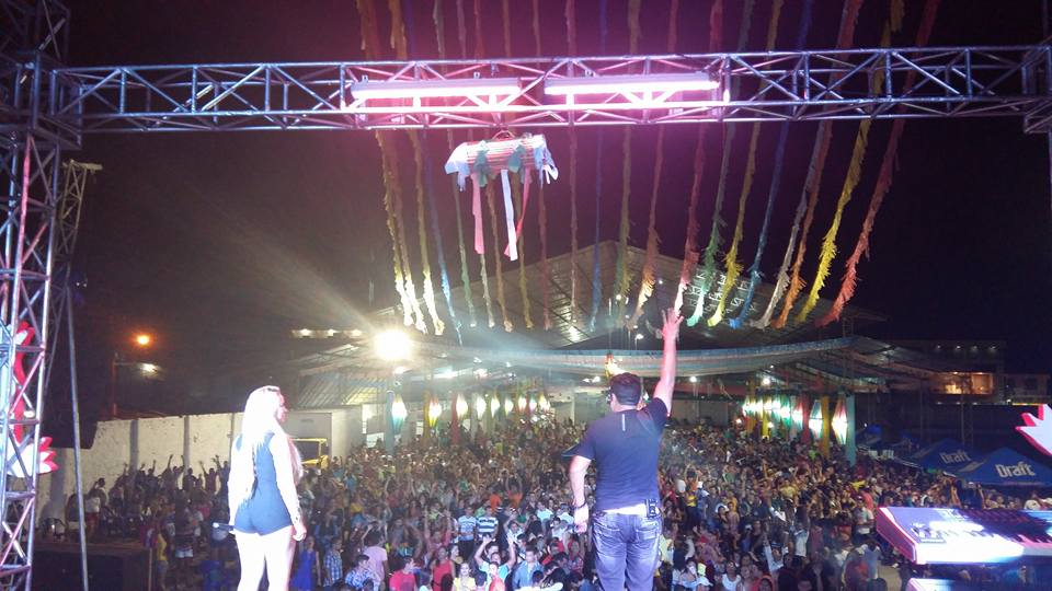 Perola no festival